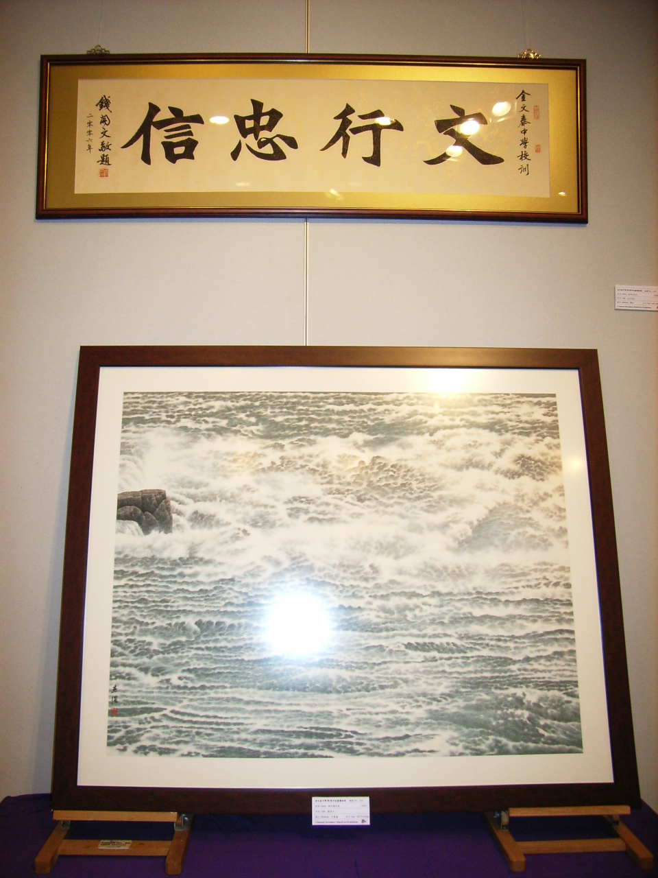 金文泰中學之校訓 --- "文行忠信" by TCWL